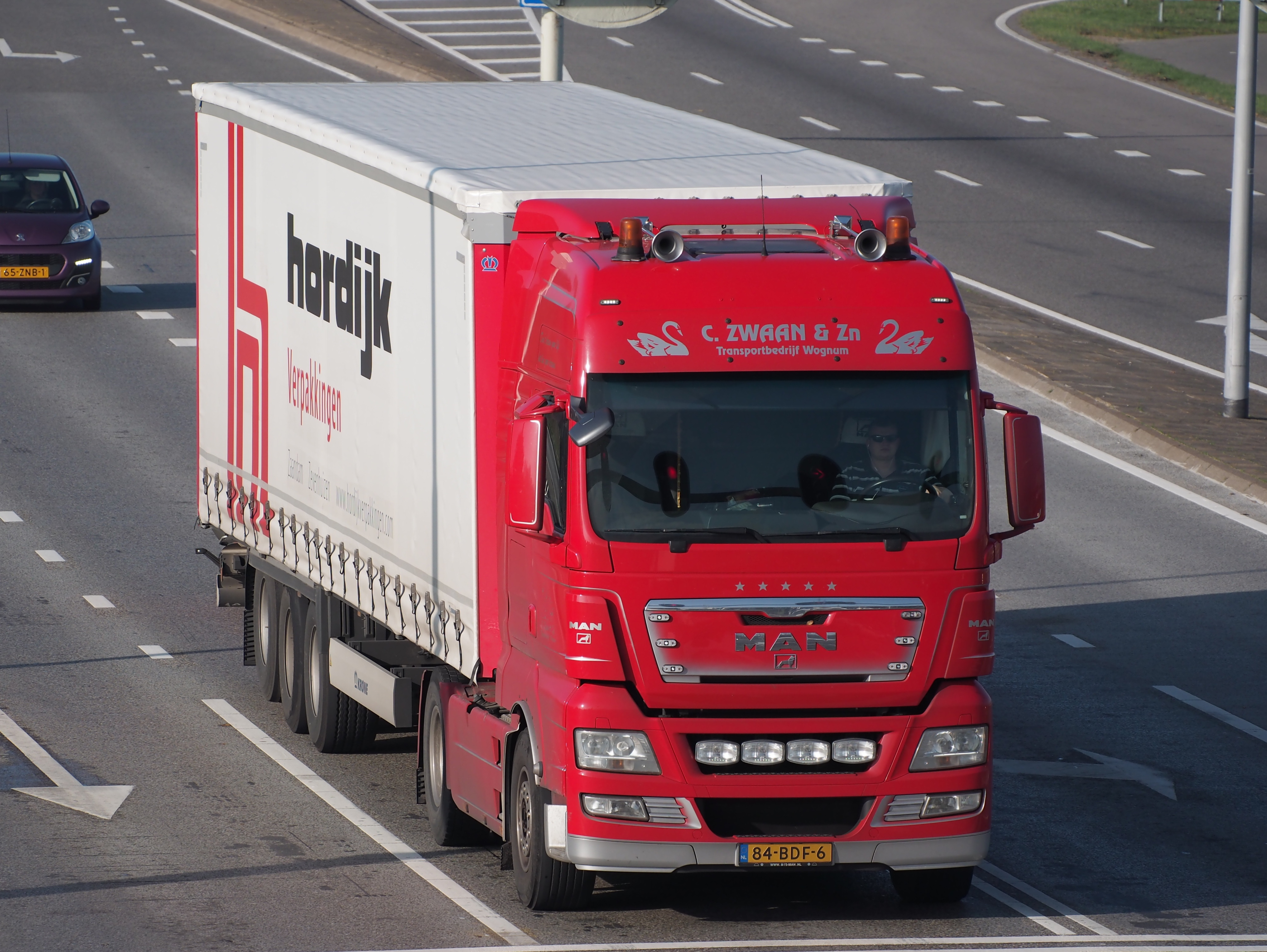 MAN truck at Leiden.